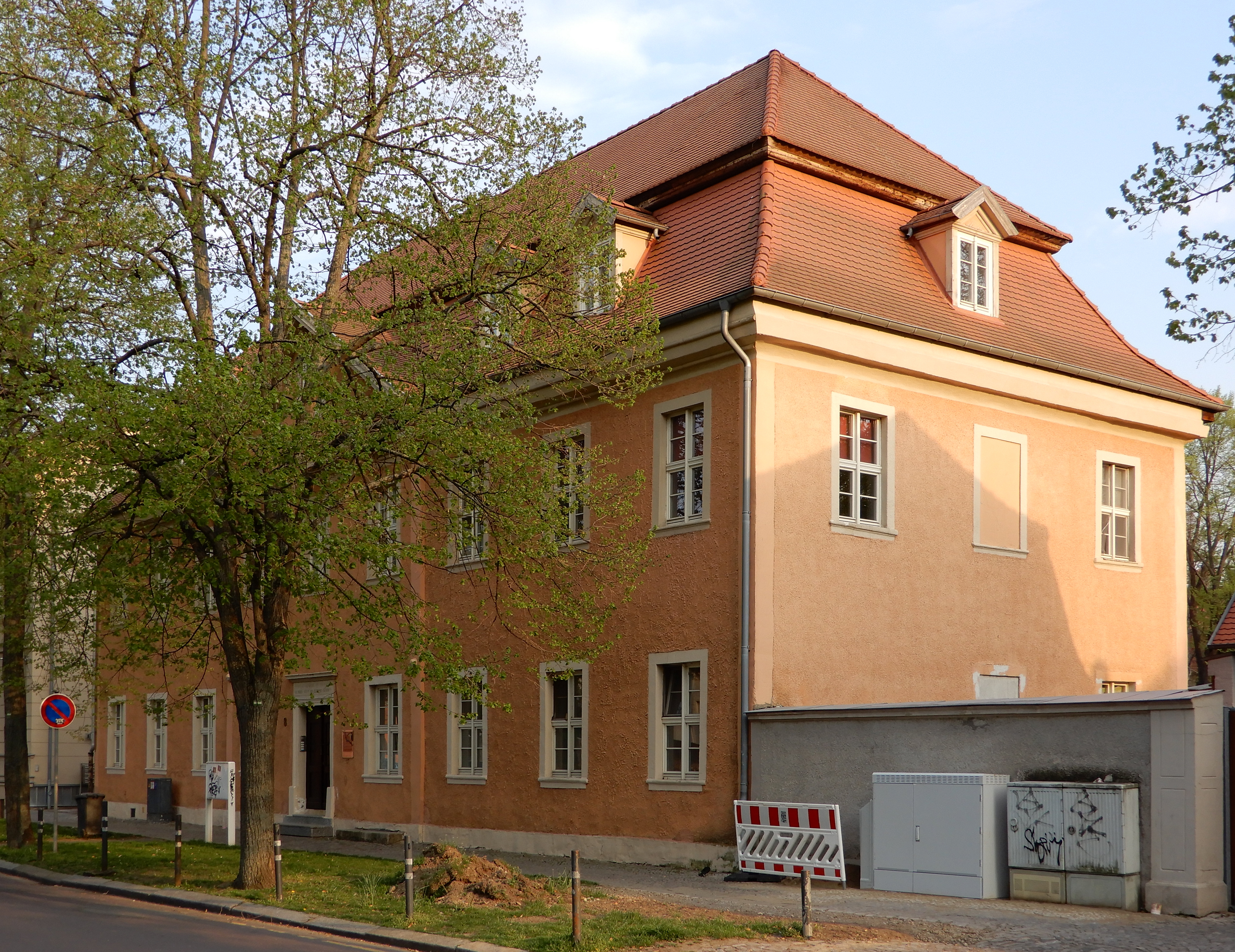 Gebäude Bestehornstraße 8 in Aschersleben